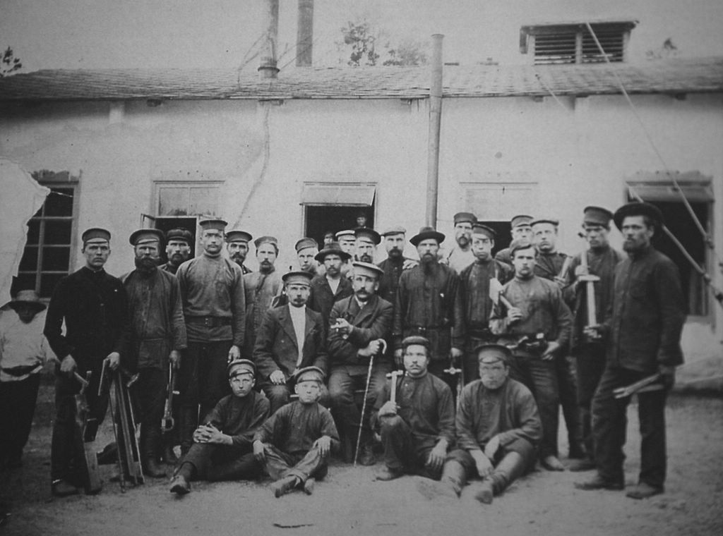 Рабочие сверлильного цеха Каменского завода, 1914